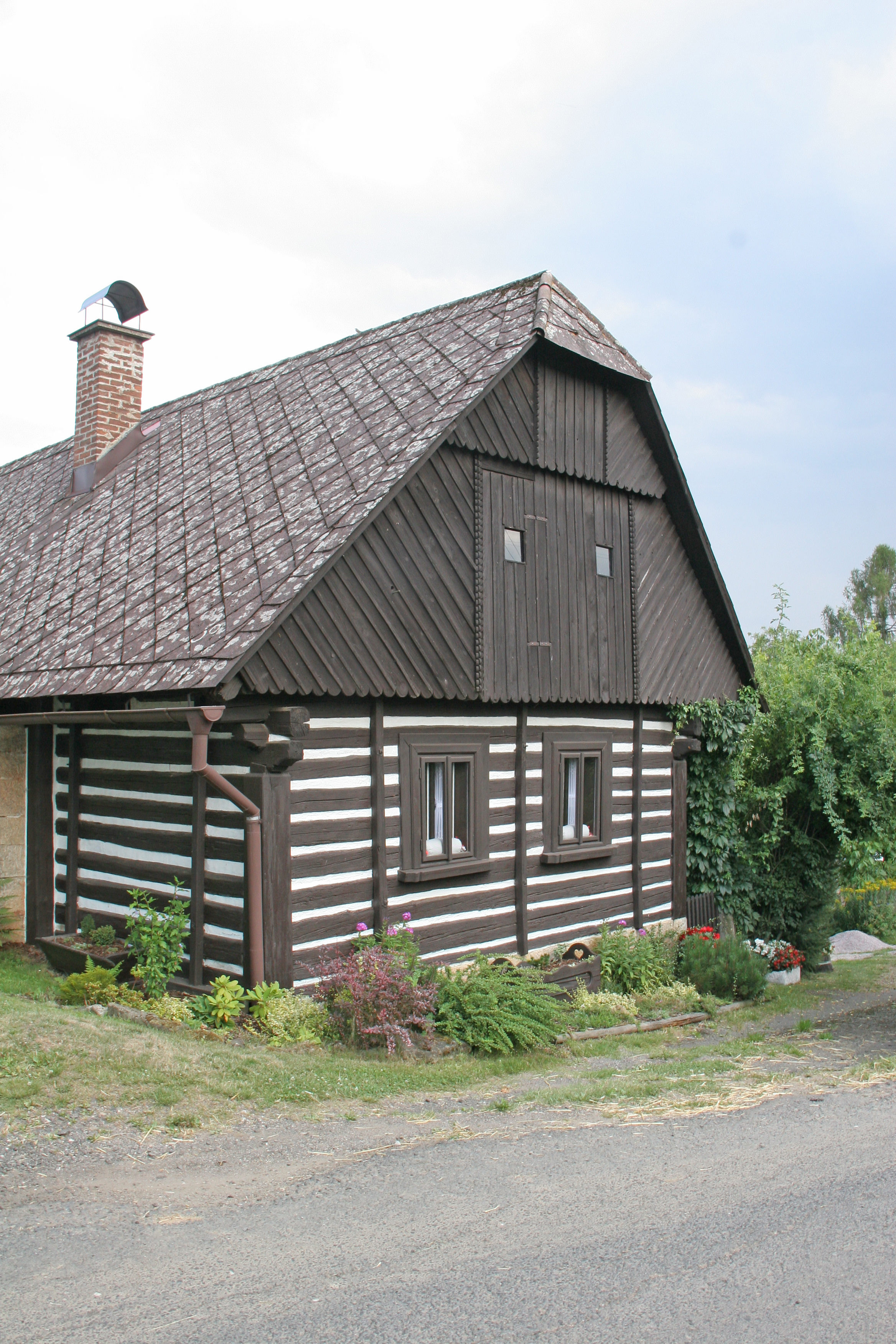 Želejov čp. 4